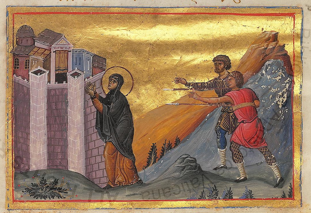 Преподобная Пелагия Антиохийская Константинополь. 985 г. Миниатюра Минология Василия II. Ватиканская библиотека. Рим.